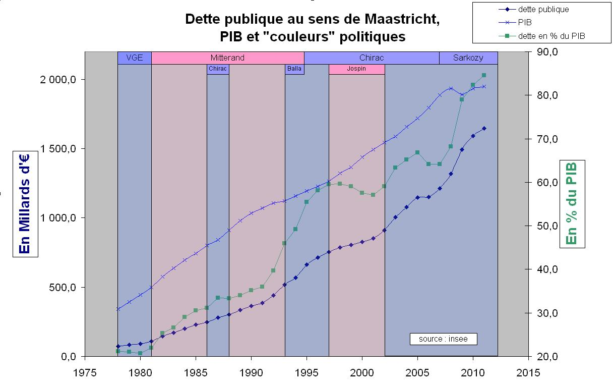 dette publique de la France au sens de Maastricht depuis 1975 et présidents associés